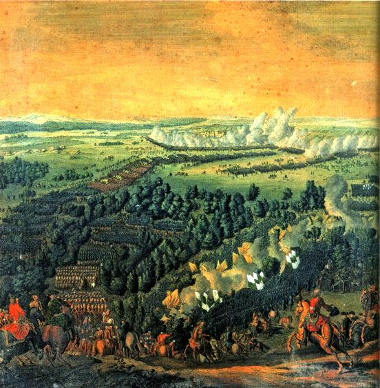 Schlacht von Golovchin. Denis Martin Junior